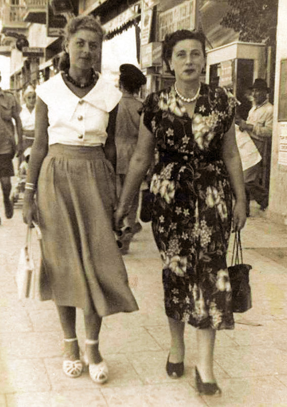 שולמית אלוני בצעירותה עם אימה